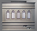 Truhenorgel